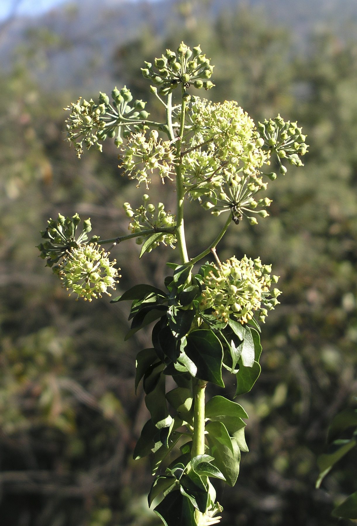 Hedera helix, umbelas. Losar de la Vera (Cáceres, España). 21-octubre-2007.